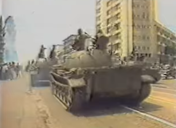 Des blindés des forces armées zaïroises lors d'un défilé. Extrait du reportage "Mobutu Sese Seko : bâtisseur du Zaïre nouveau", 1985, diffusé via la RTBF